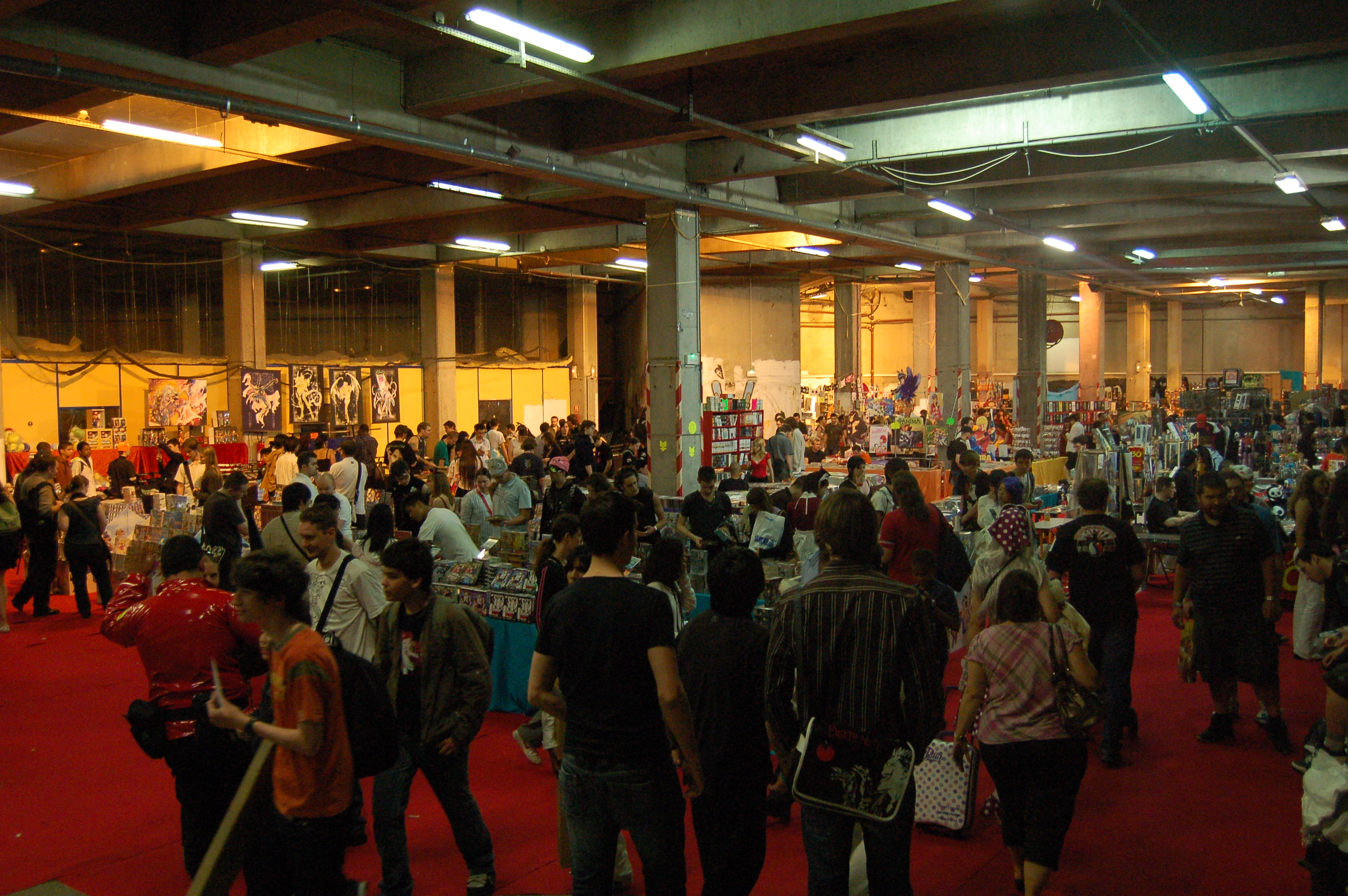 Convention de l'animation de l'EPITA 2009 - Forum